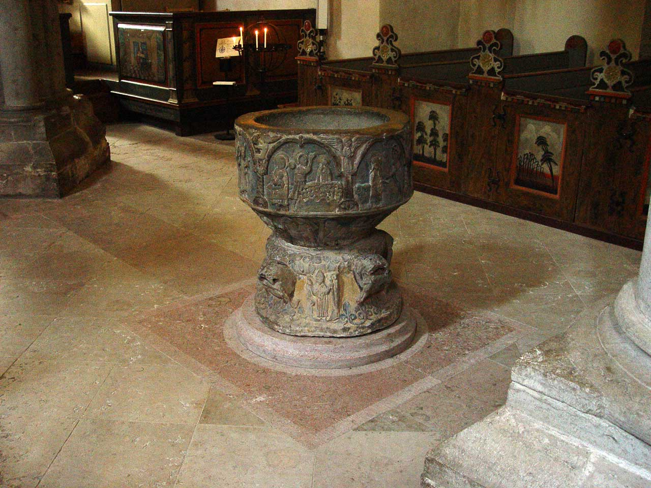 Kirche von Stenkyrka auf Gotland. Taufbecken (12.Jh.)